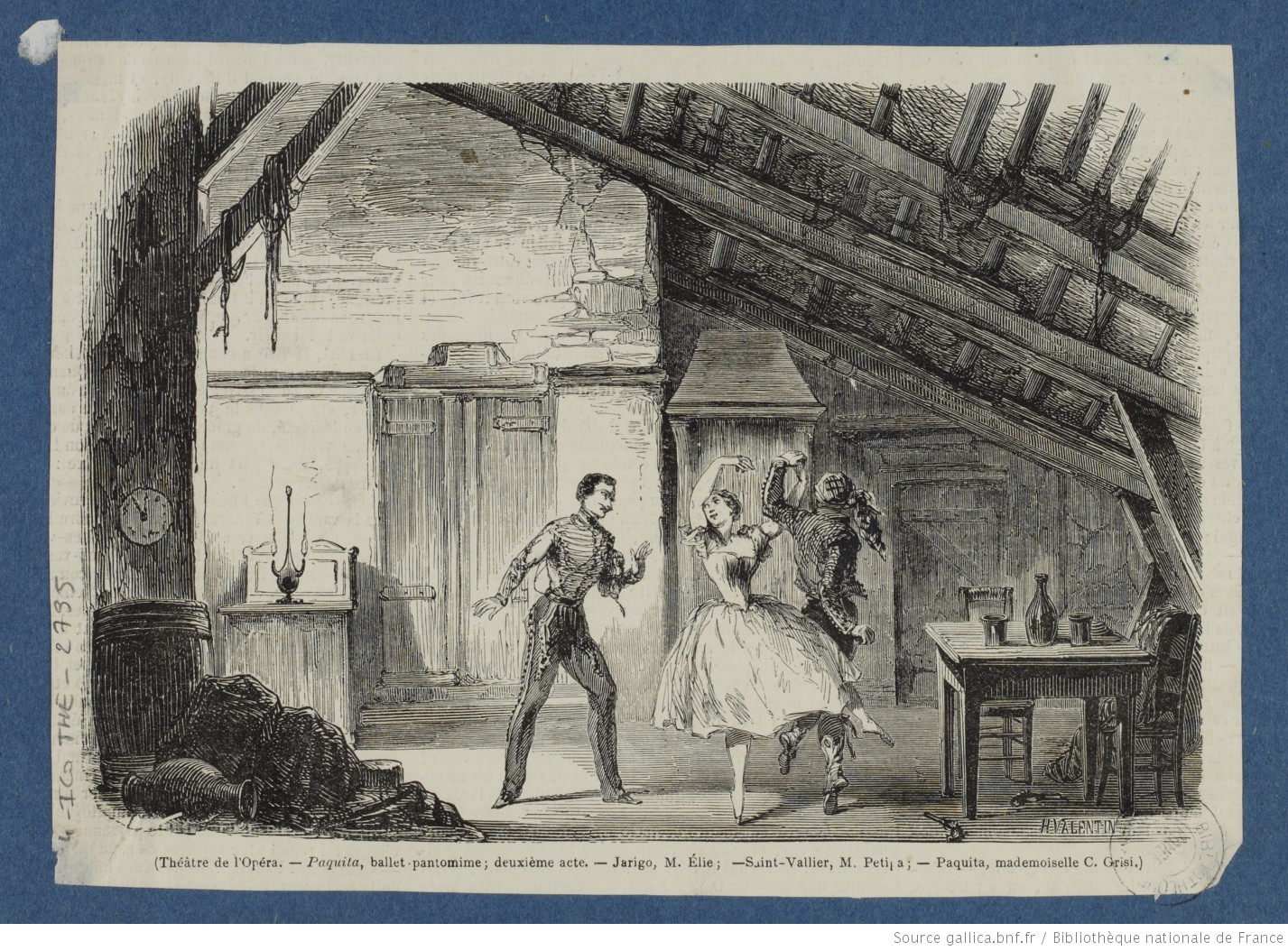 Illustration d'une scène du 2ème acte de Paquita, ballet de Paul Foucher sur une musique d'Ernest Deldevez